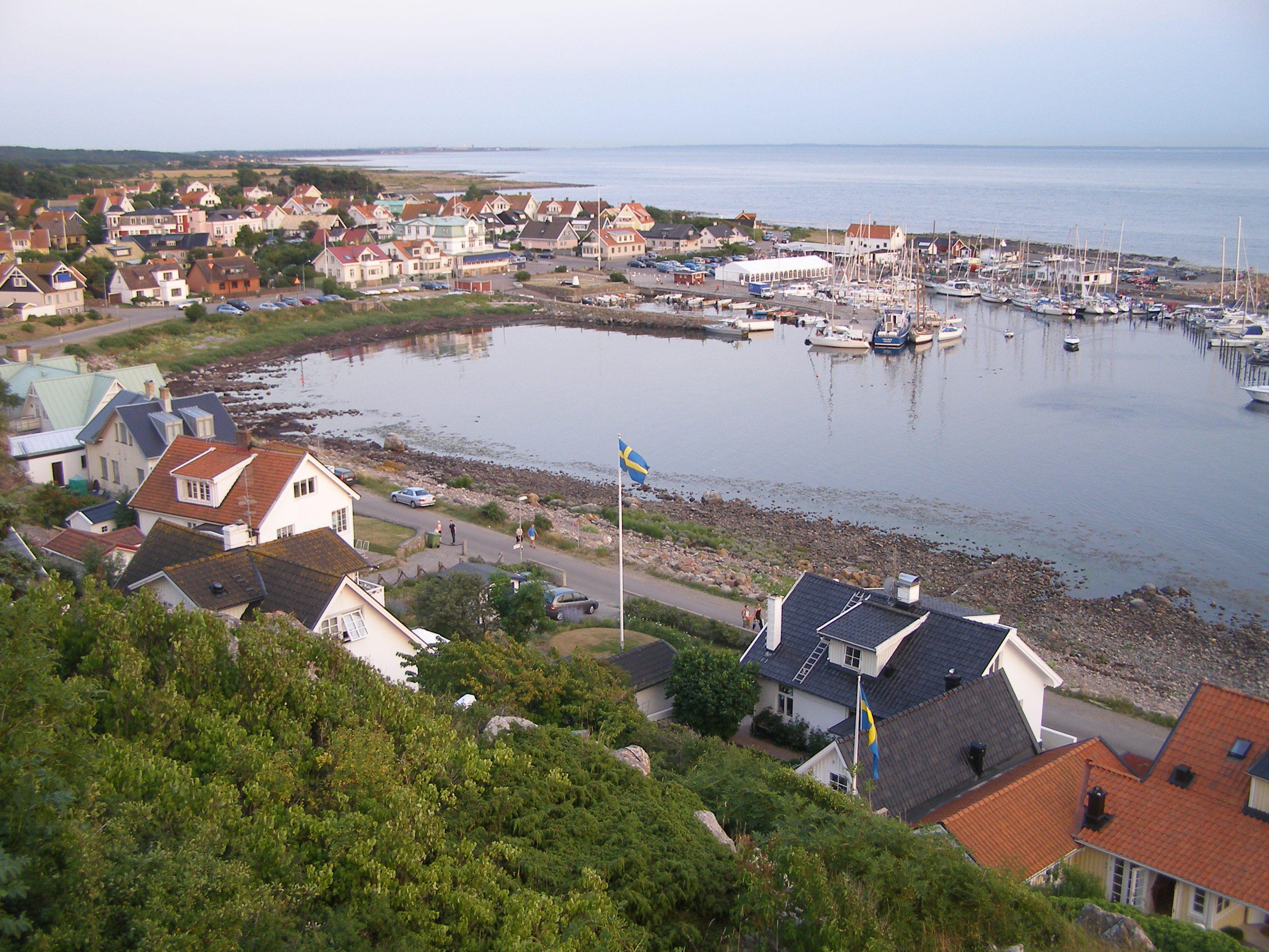 Molle, Sweden (harbour)